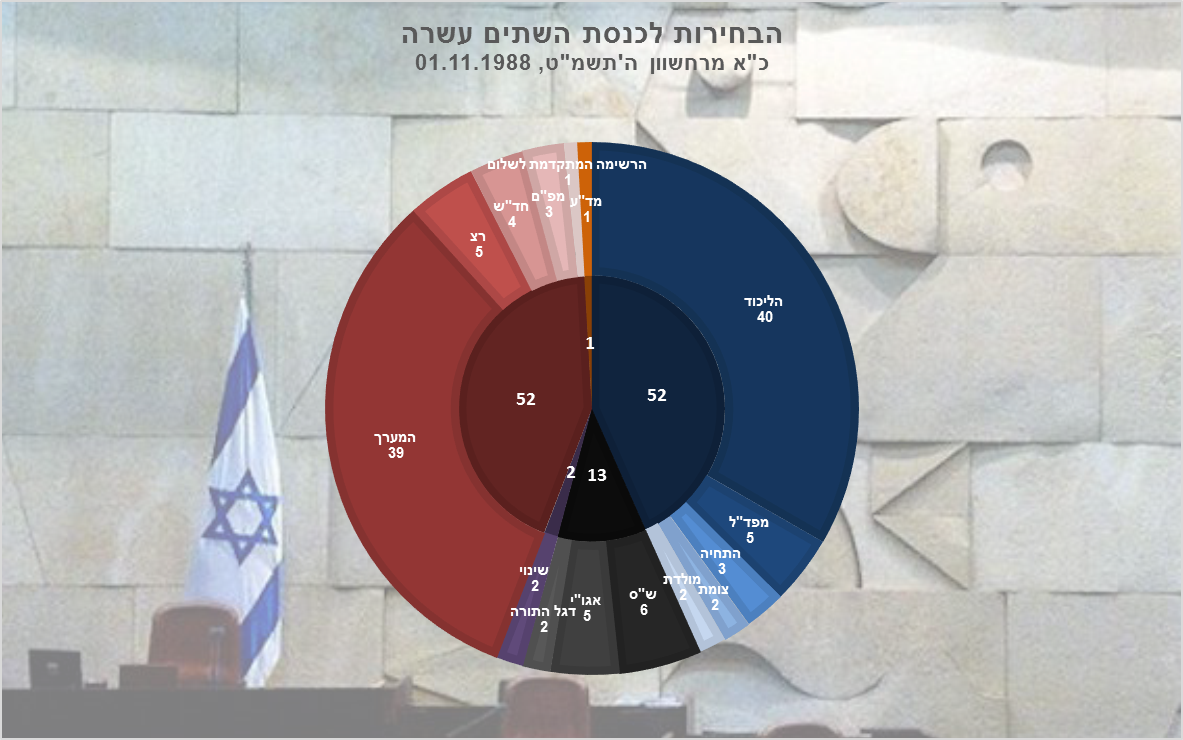 תוצאות הבחירות לכנסת השתים עשרה